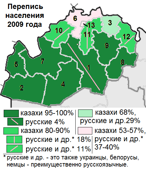 Доля казахов, русских и других по районам Западно-Казахстанской области по итогам переписи населения 2009 года